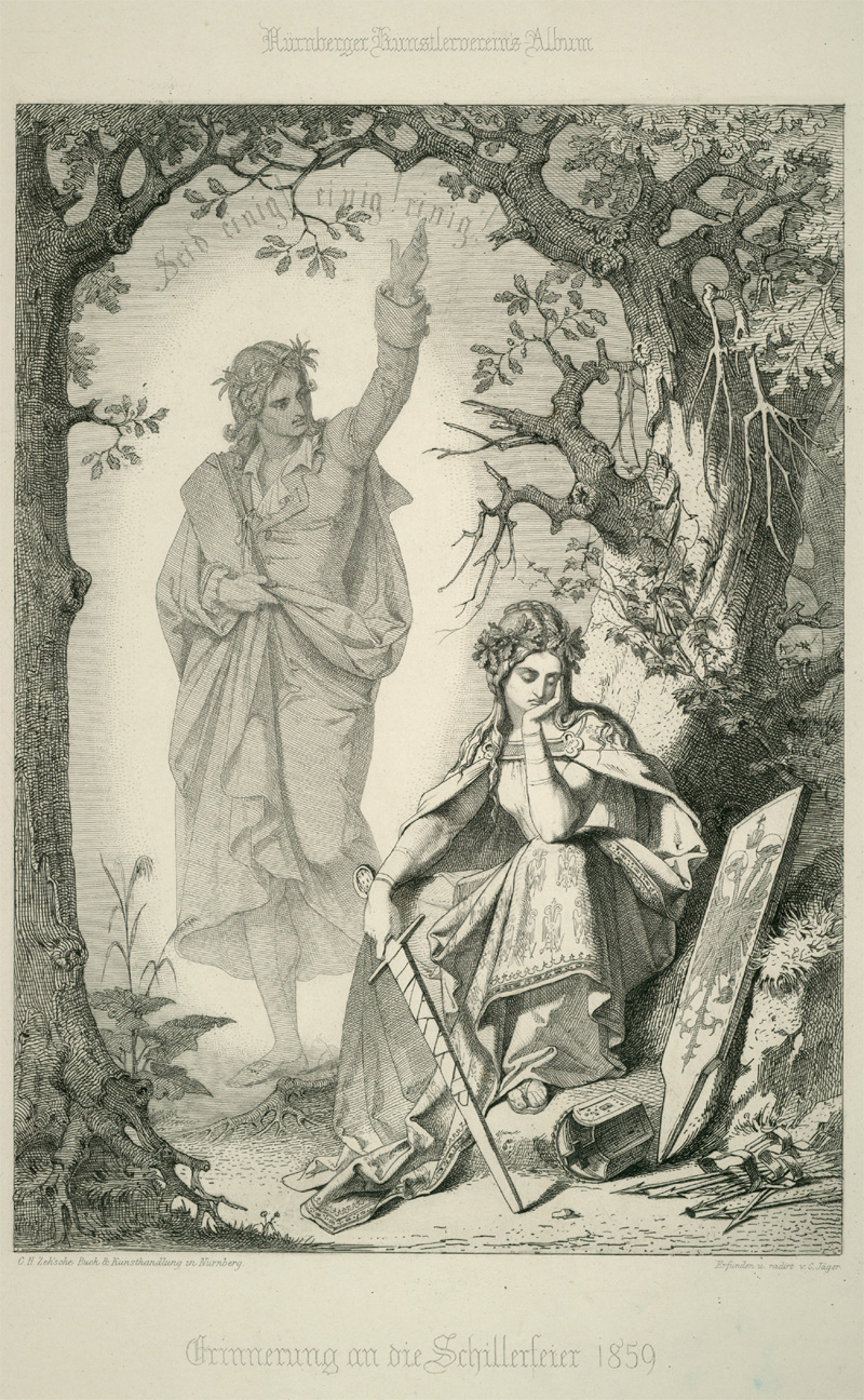 Erinnerung an die Schillerfeier 1859 "erfunden und radirt von C. Jaeger."; erschienen im Nürnberger Künstlervereins-Album; C. H. Zeh'sche Buch & Kunsthandlung in Nürnberg.